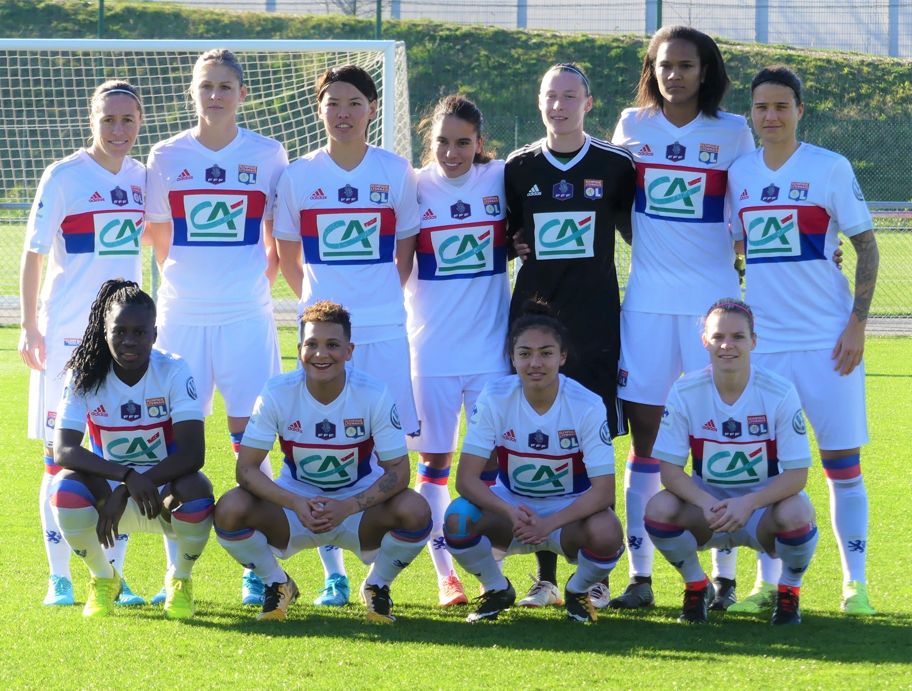 Effectif titulaire de l'Olympique lyonnais féminin lors du match contre Yzeure en Coupe de France le 28 janvier 2018. (de gauche à droite) Haut : Camille Abily, Corine Petit, Saki Kumagai (熊谷紗希), Amel Majri, Pauline Peyraud-Magnin, Wendie Renard, Dzsenifer Marozsán - Bas : Griedge Mbock, Shanice van de Sanden, Selma Bacha, Eugénie Le Sommer